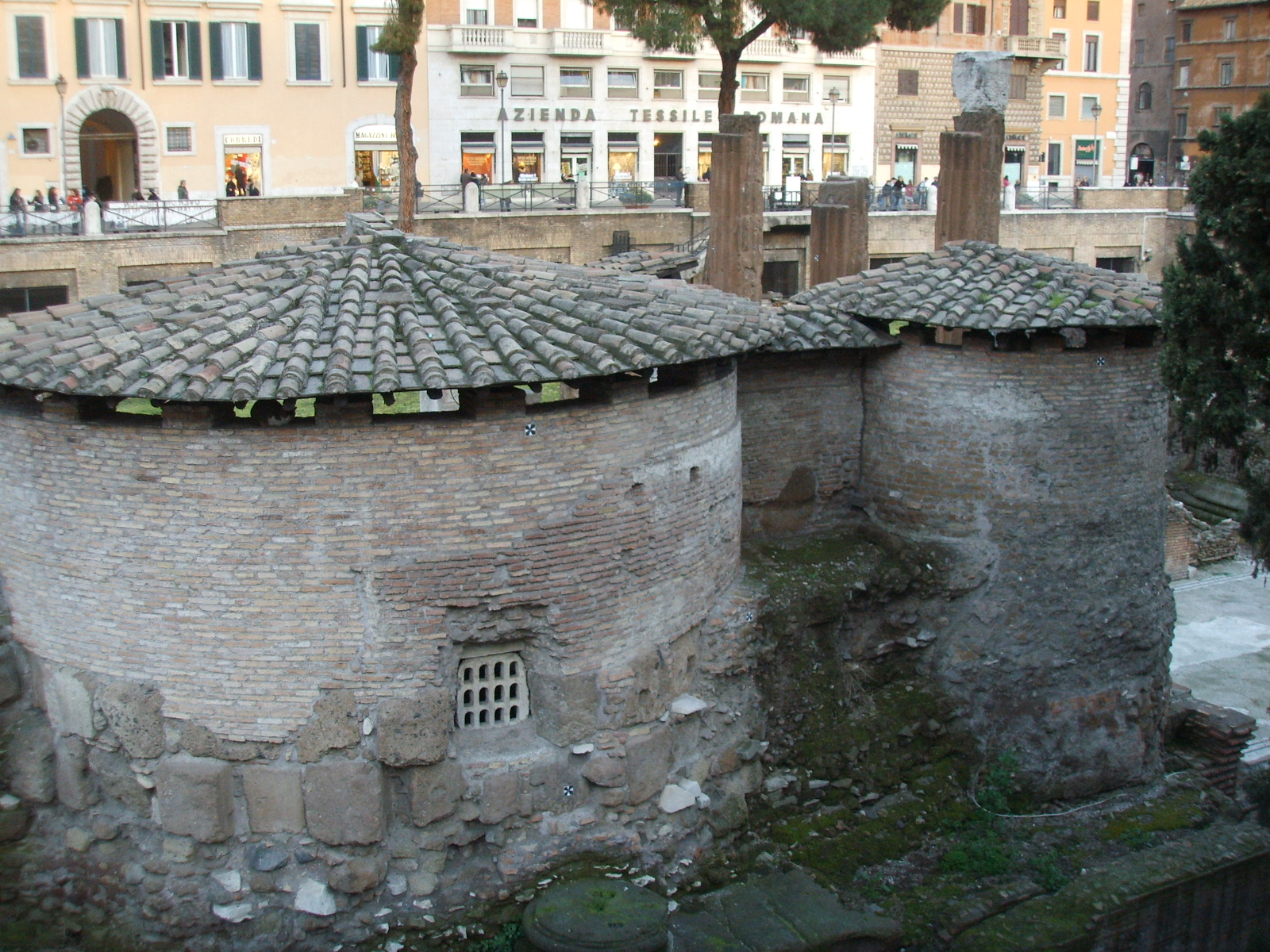 Il "Tempio A" dell'Area Sacra di Largo di Torre Argentina a Roma, risalente al III secolo a.C. Si ipotizza che corrisponda al tempio di Giuturna (ninfa delle fonti) o del tempio di Iunonis Curritis. Il primo fu fatto costruire da Quinto Lutazio Catulo dopo la vittoria dei romani contro Falerii nel 241 a.C.; il secondo da Quinto Lutazio Cercone a seguito della vittoria sui Falerii del suo parente Quinto Lutazio Cercone, sempre nel 241 a.C. L'identificazione più probabile è la prima. Su questo tempio venne costruita la chiesa di San Nicola dei Cesarini, di cui sono ancora presenti alcuni resti (come le absidi visibili in questa foto, ed un altare).